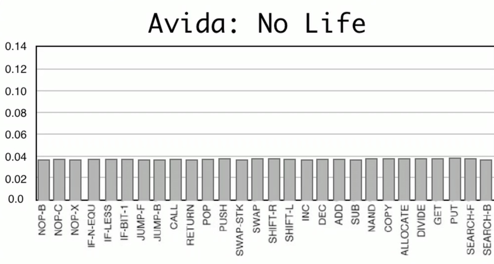 Réparation des codes informatiques dans un environnement d'Avida non-vivant.